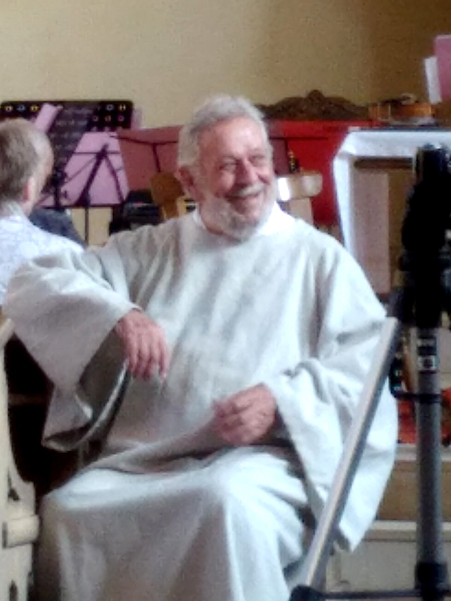 Mons. Winfried Pilz v kostele svatého Františka z Asissi ve Studánce během koncertu 26. srpna 2017